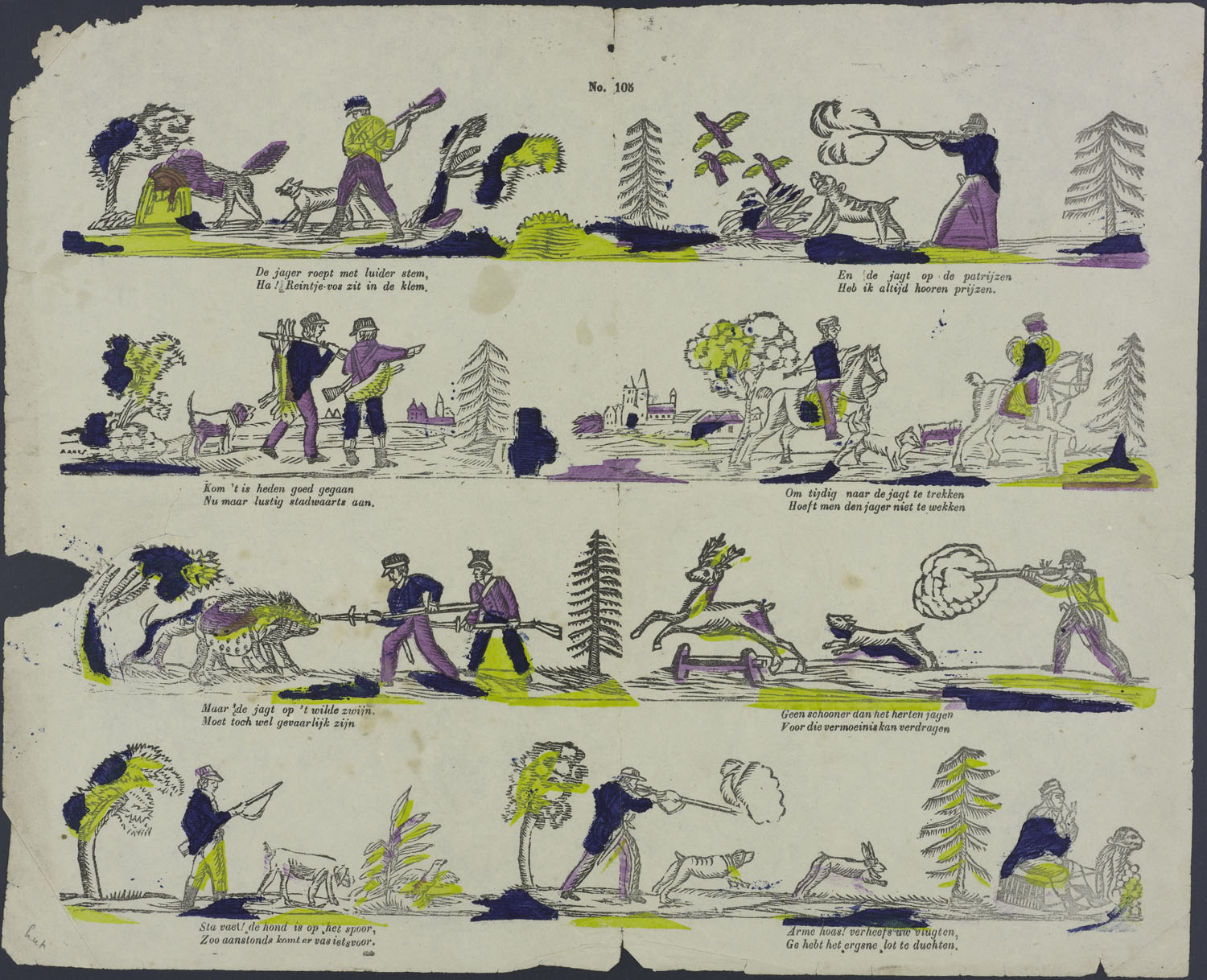 Oblong centsprent met 4 x 1 niet omkaderde langgerekte houtsnede, met afbeeldingen van de jacht: een vos in een klem, schieten op patrijzen, terugtocht met hazen aan de riem, ruiters en honden, jacht op wilde zwijnen, op herten, de hond speurt, een haas wordt geschoten. Bevat tweeregelige rijmende onderschriften.